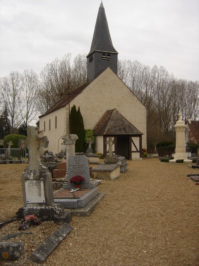 Eglise de Barjouville